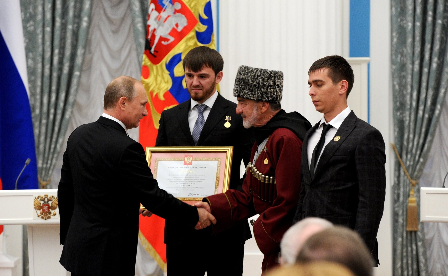 Вручение грамот о присвоении звания «Город воинской славы». Грамота о присвоении почётного звания «Город воинской славы» вручена представителям Грозного.